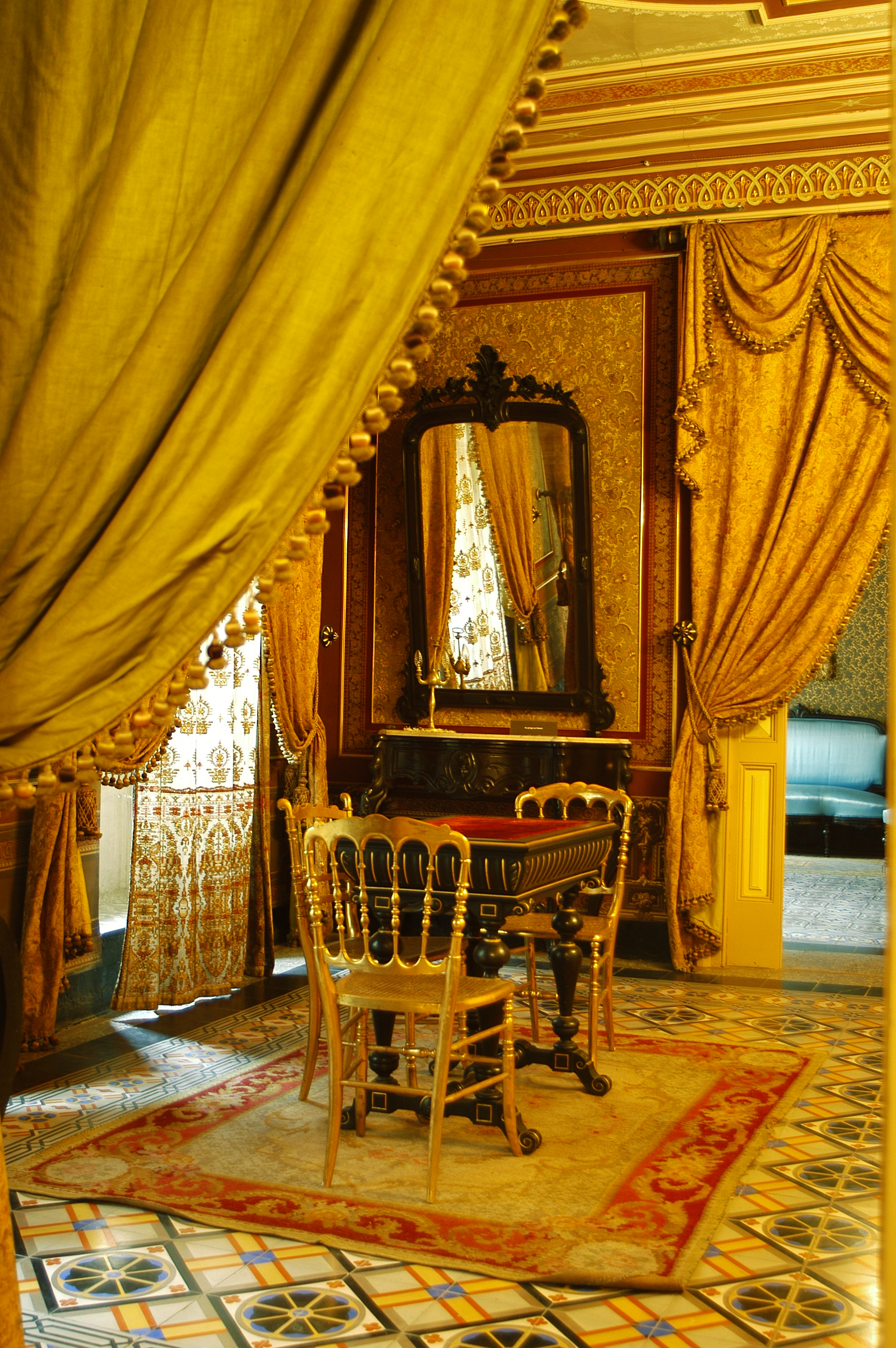 Saló Gran de la Casa Museu Duran i Sanpere de Cervera